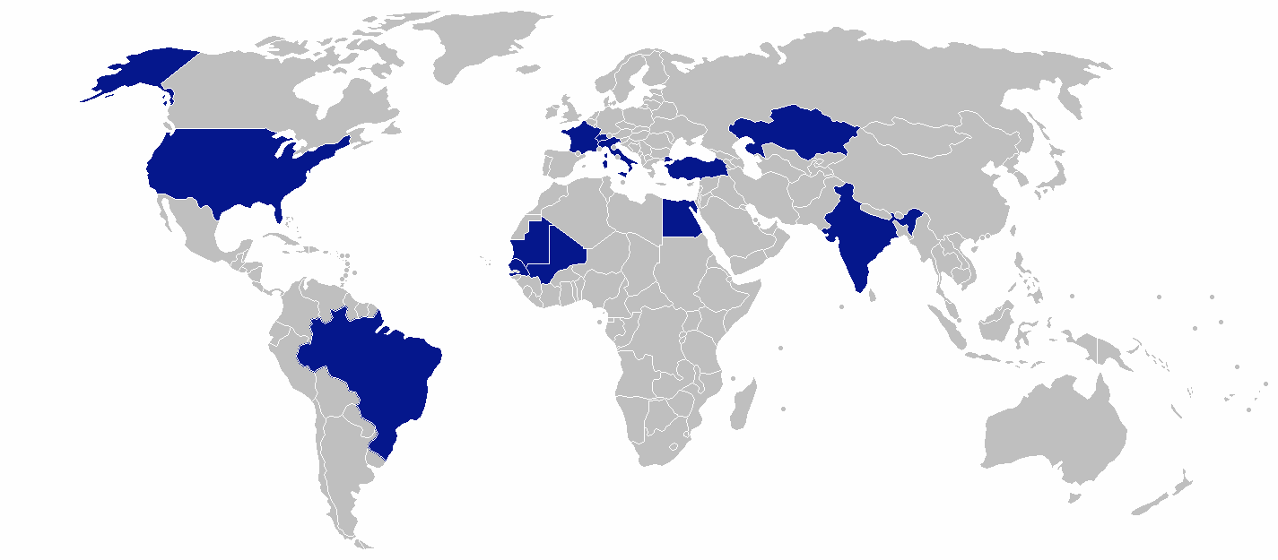 Les 12 pays où se trouve le groupe Vicat dans le monde